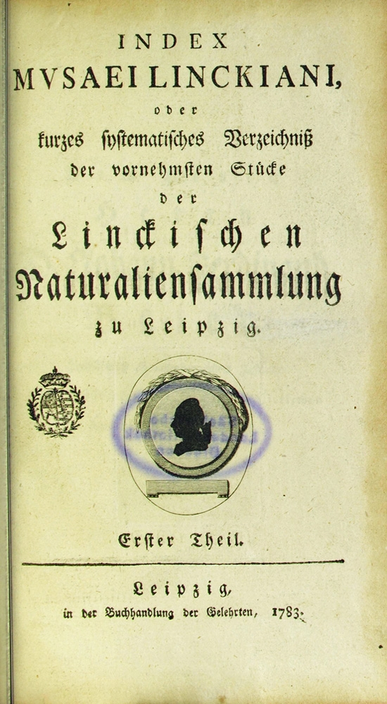 Titelblatt des ersten Bandes zum Verzeichnis der Linckschen Sammlung Leipzig